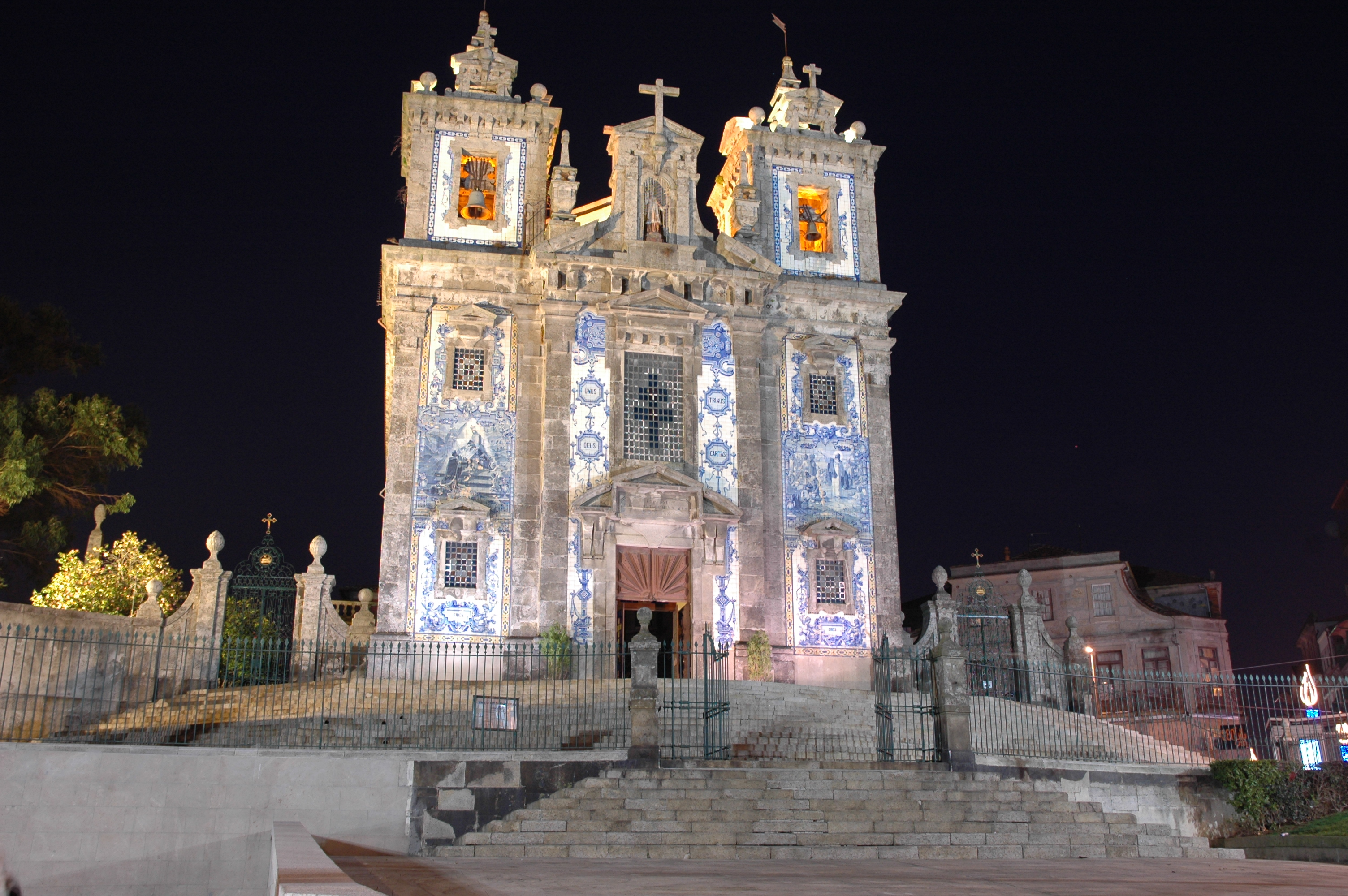 Porto - Església de Sant Ildefons